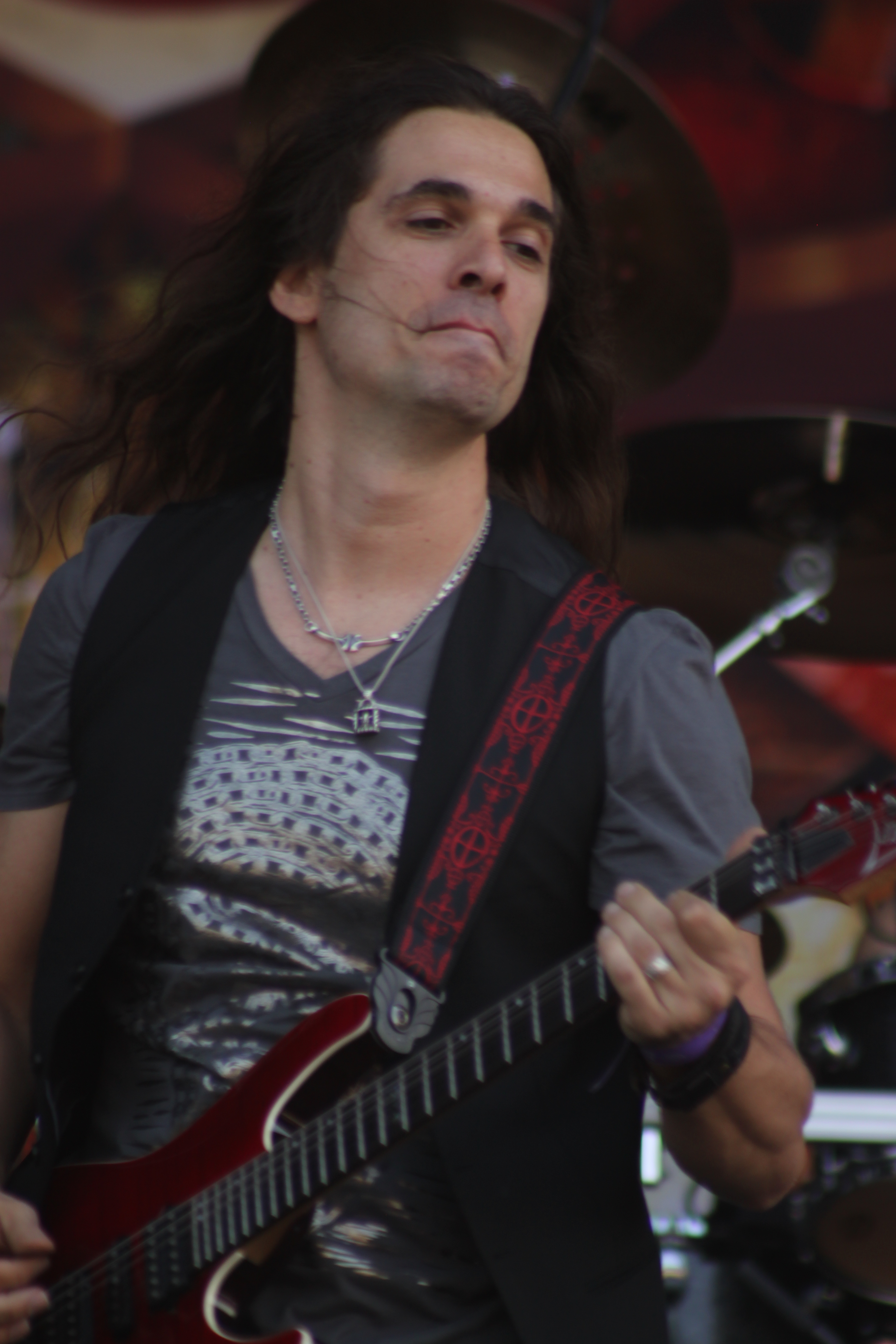 Hellfest 2014. Kiko Loureiro, Angra. Fr-44-Clisson.